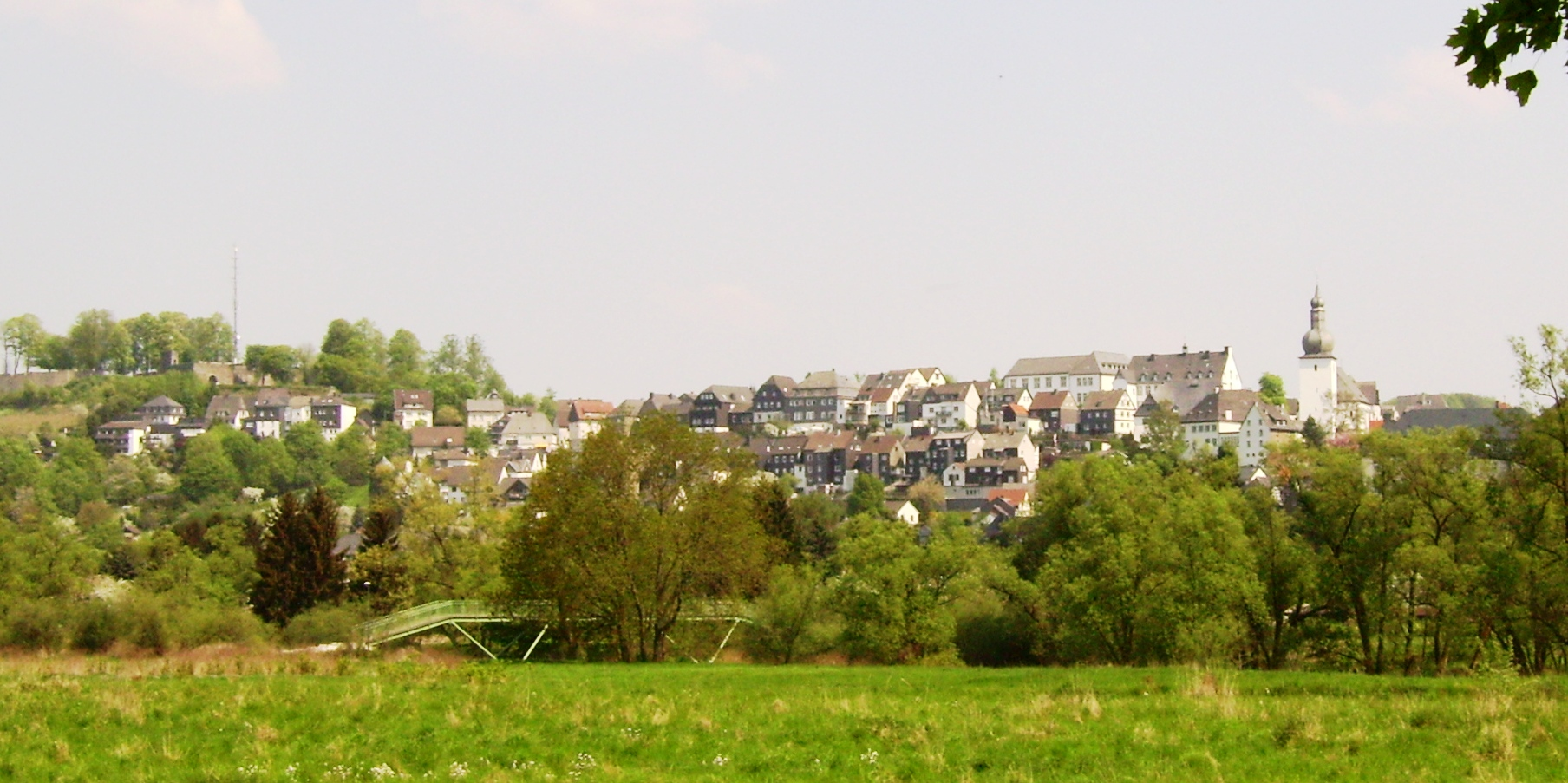 Panorama Arnsberg von Süden